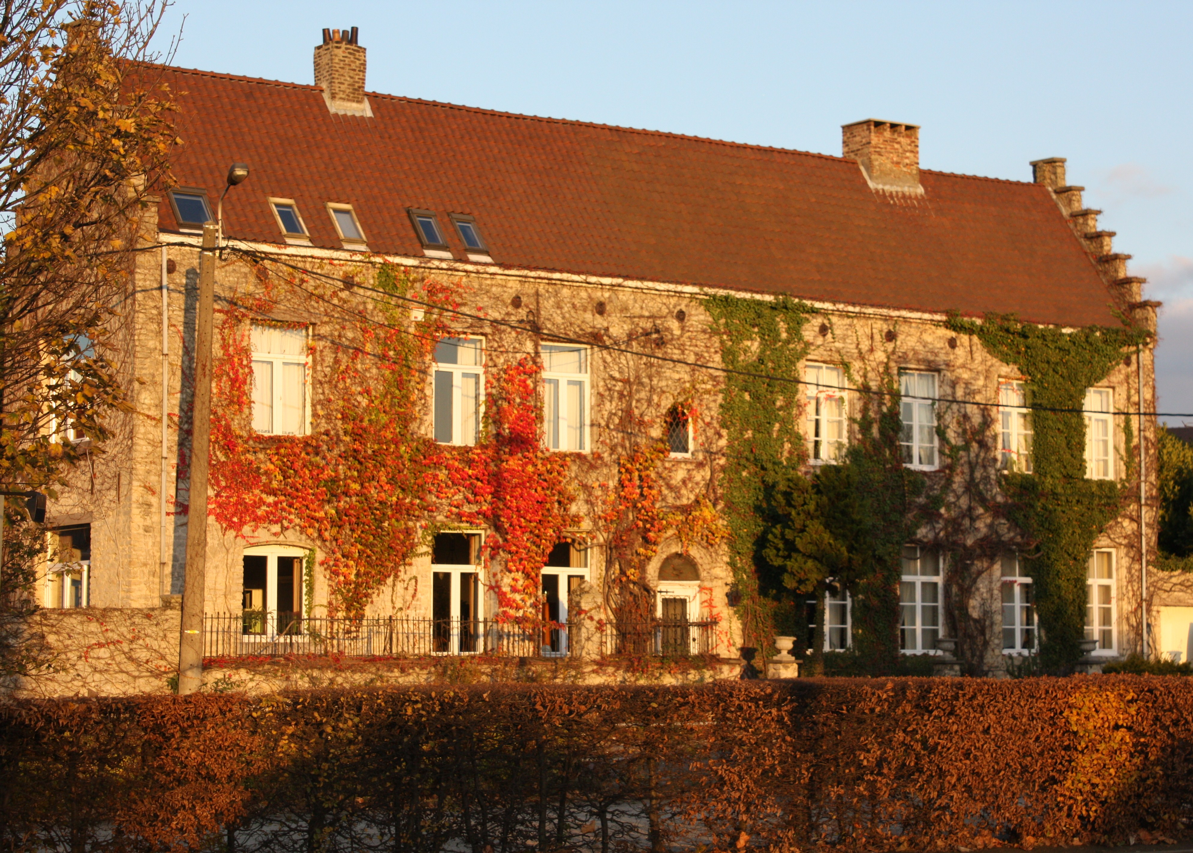 Hector Henneaulaan 160-162